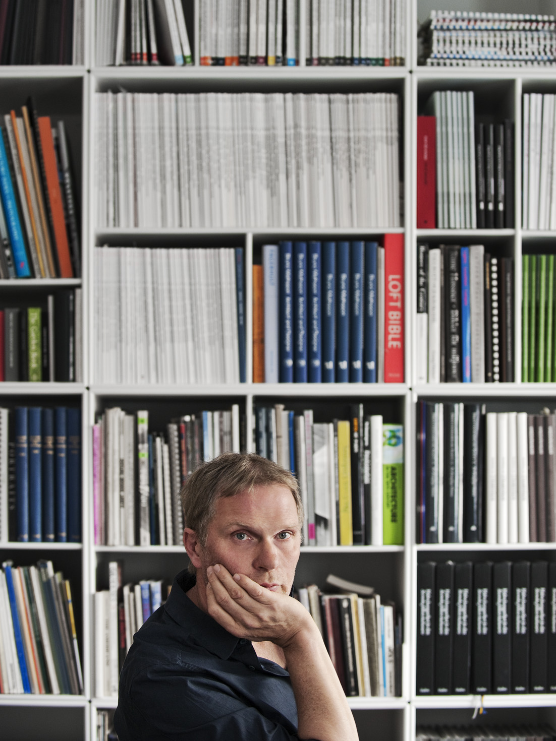 Åke E:son Lindman Porträtt2009/04